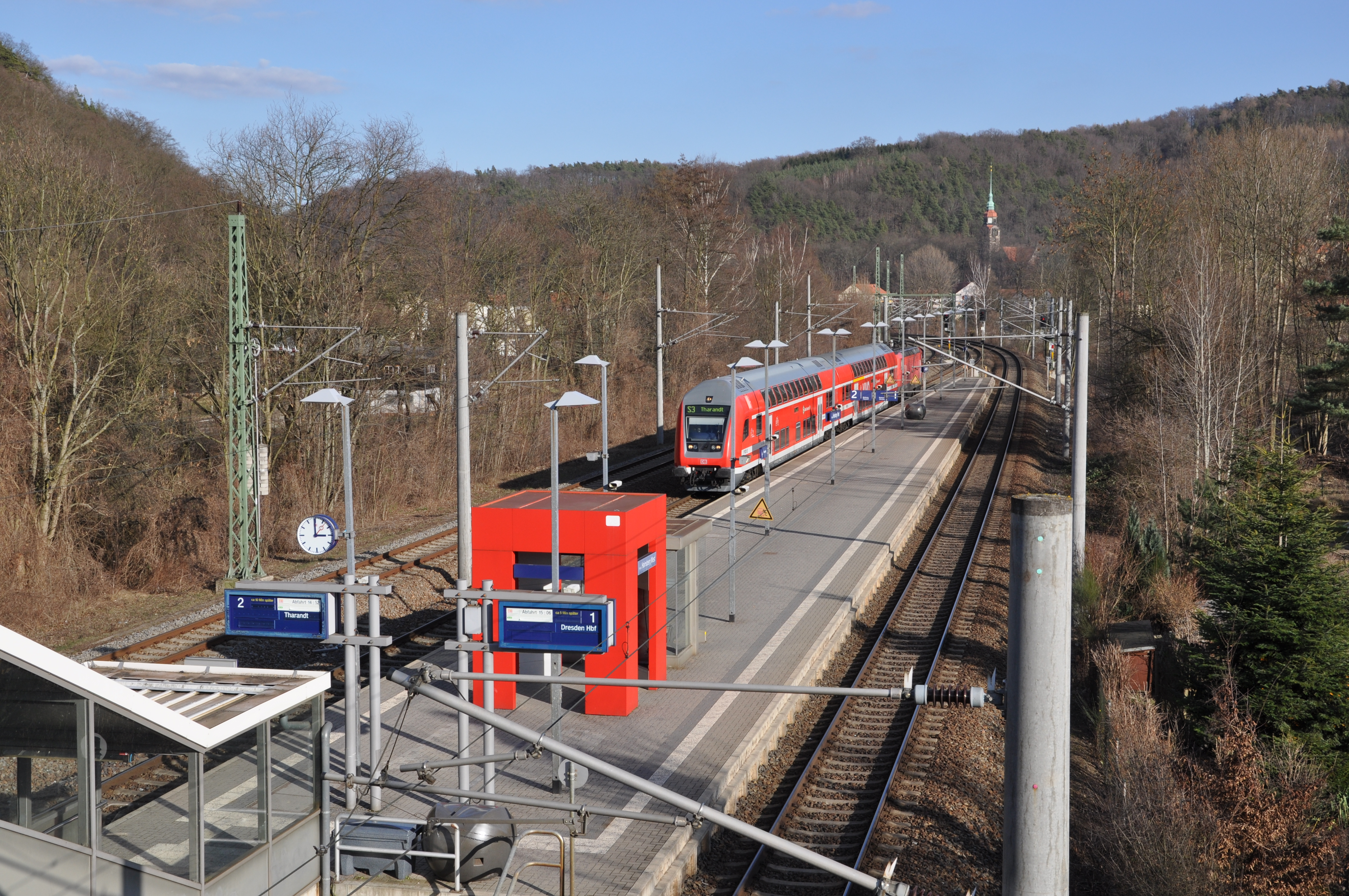 Haltepunkt Freital-Hainsberg West mit Reisezug der Linie S3 Dresden Hbf-Tharandt, Blick Richtung Dresden. Direkt am Bahnsteig befinden sich die beiden Gleise der Strecke 6258 (Dresden–Werdau), nördlich davon (im Bild links) das Gleis der Strecke 6259 (Freital Ost–Tharandt)